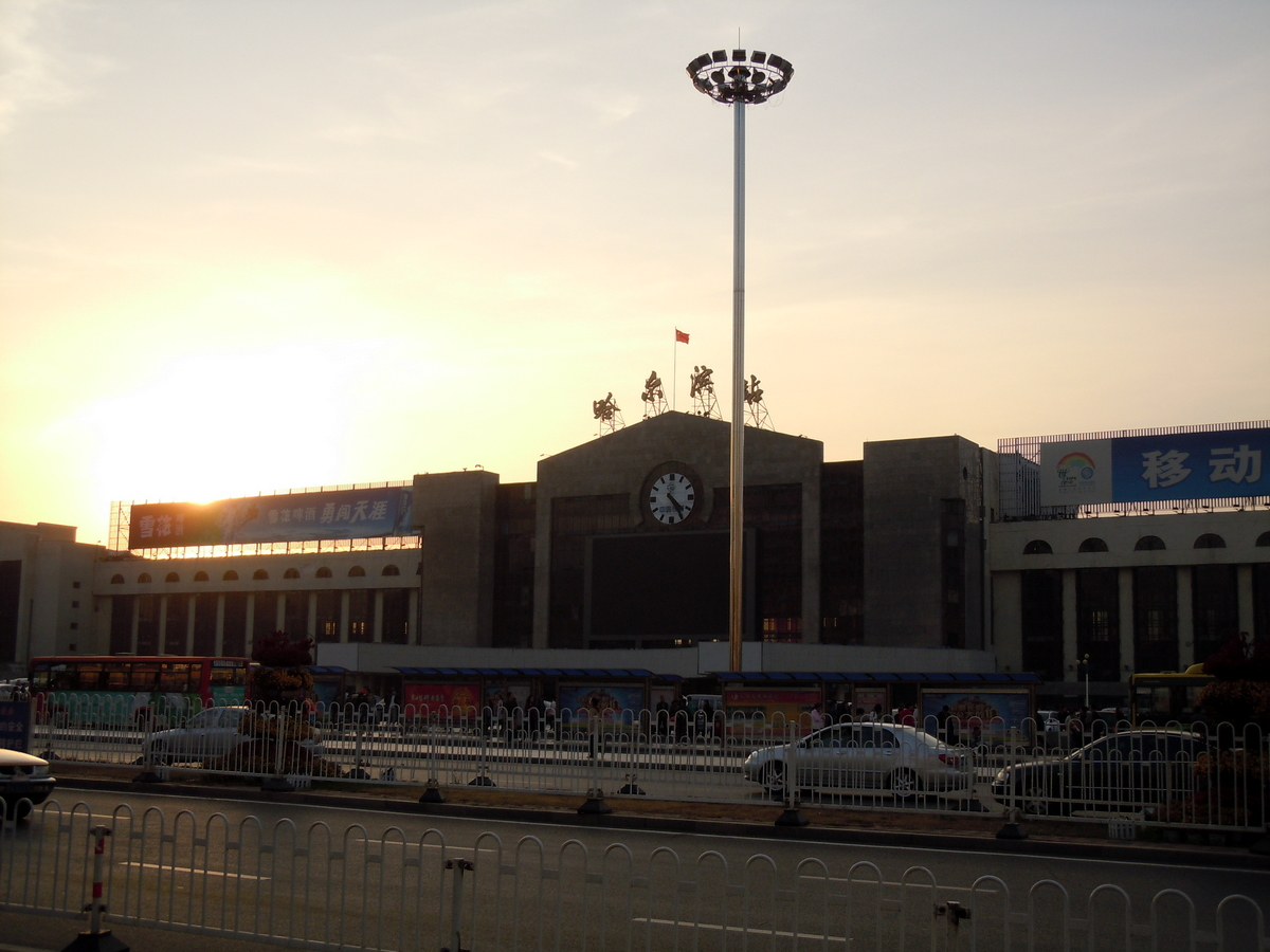 哈尔滨火车站